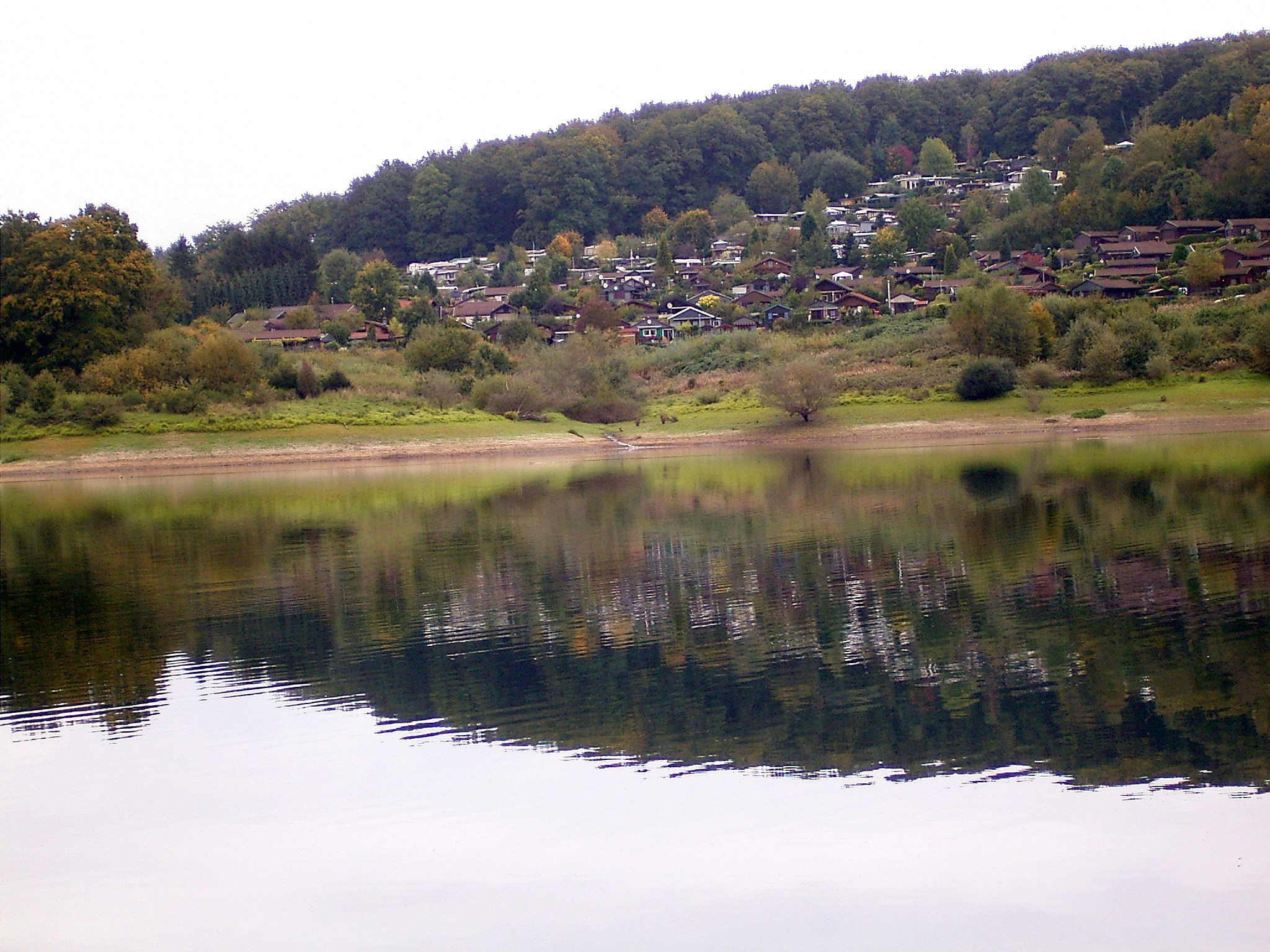 Wuppertalsperre in Radevormwald-Kräwinkel, Blick von Haus Hammerstein in Hückeswagen.